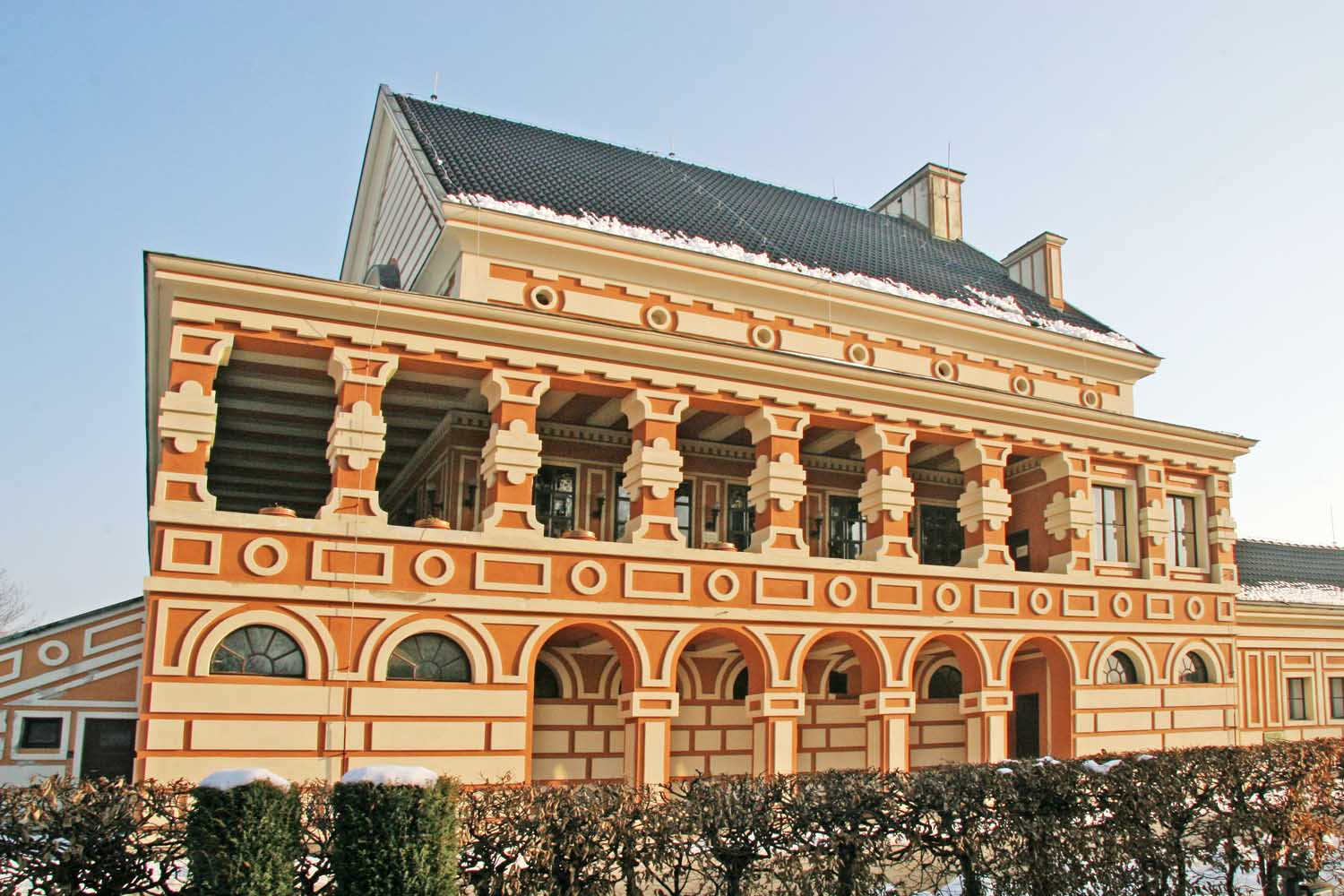 Crematorium in Pardubice, Czech Republic